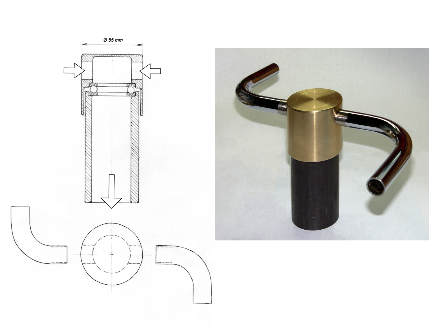 Příklad pokusného Segnerova kola vhodného pro experimenty v reverzním režimu.